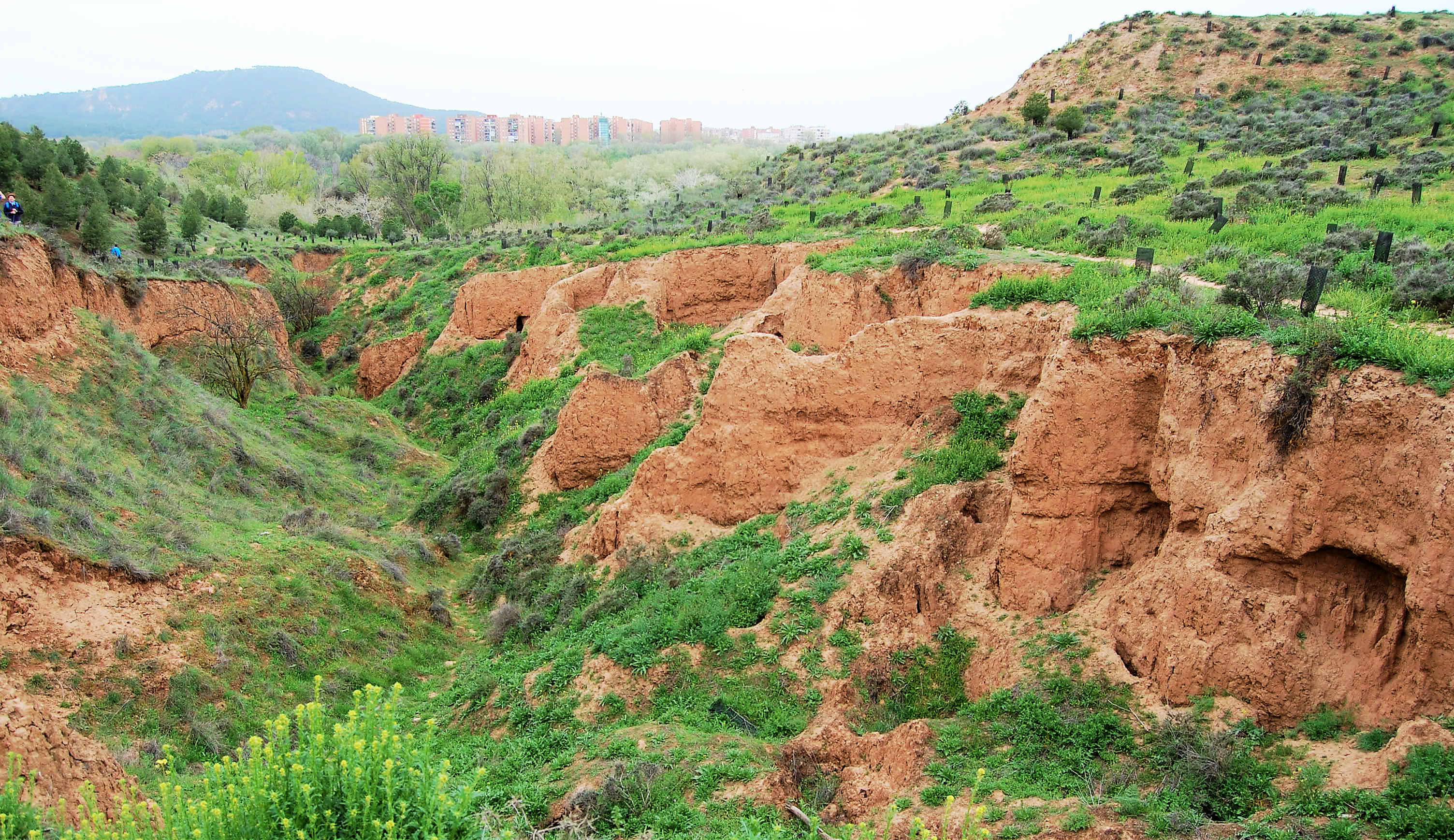 Cuenca del río Henares con sus cárcavas de arenisca a su paso por Alcalá de Henares (Comunidad de Madrid - España). Fotografía tomada en el Parque de los Cerros, al fondo se observa el cerro del Viso. This is a photography of a Special Area of Conservation in Spain with the ID: ES3110001. Natura2000 entry, EEA entry